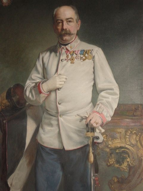 Heinrich Karl Michael, 1834 - 1909, Leopoldsorden, Eiserne Krone, Milit.Verdienstkreuz